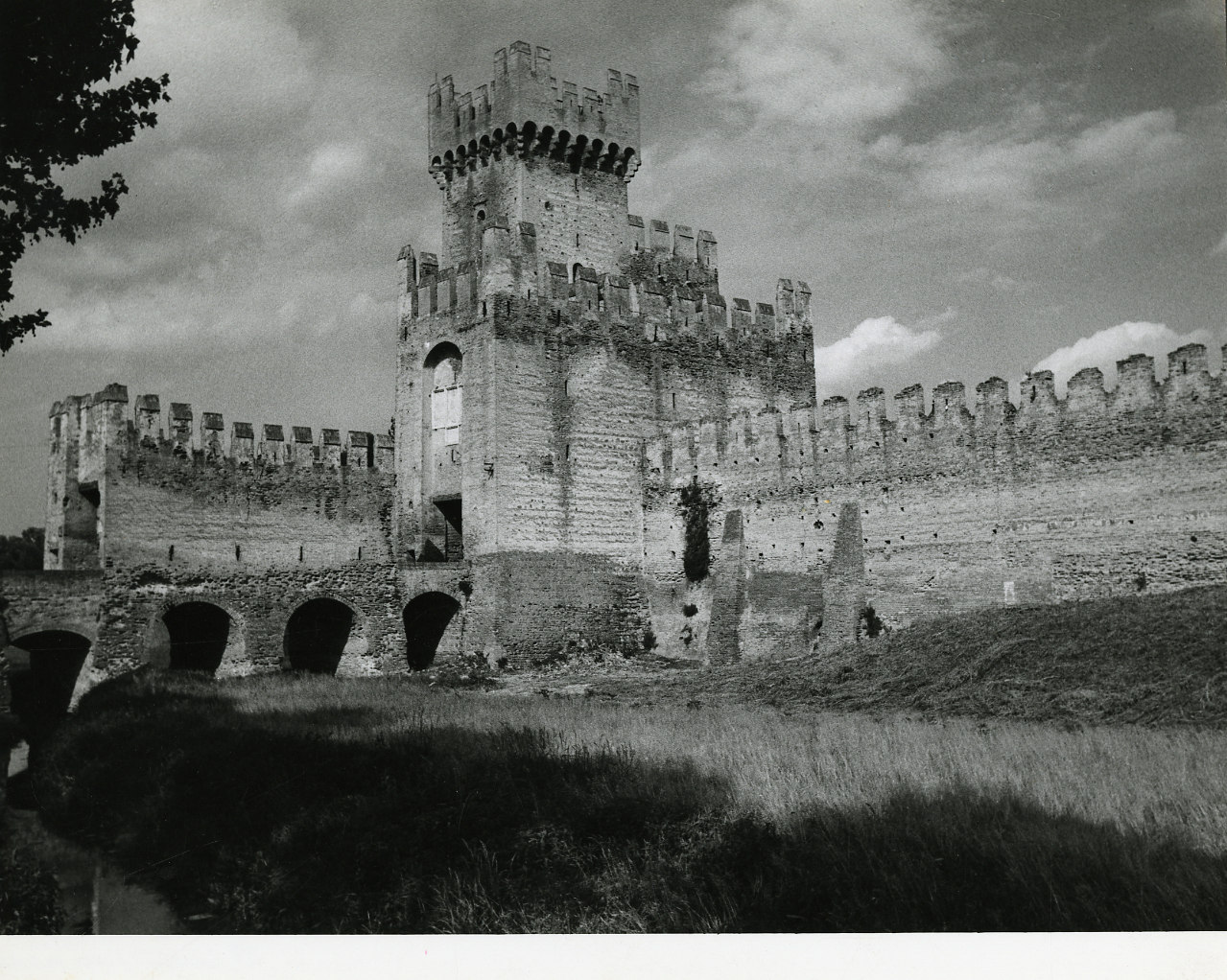 Servizio fotografico : Montagnana, 1967 / Paolo Monti. - Stampe: 3 : Positivo b/n, gelatina bromuro d'argento/ carta, 24x30. - ((Al verso delle stampe manoscritto numero di negativo corrispondente: 3376/70, 377/11, 377/5. Sul coperchio della scatola, manoscritto a pennarello: "Emilia/ Centri storici Montagnana". - Occasione: Documentazione per la pubblicazione: Diego Valeri (a cura di), Padova: i secoli, le ore, Bologna, edizioni Alfa, 1967. - Fonte: Monografia di Valeri Diego (a cura di): Padova: i secoli, le ore, Bologna, edizioni Alfa (1967). - Fonte: Fattura di Paolo Monti: IV. Commesse/ Fattura n. 25 (1978/08/08), presso Archivio Paolo Monti